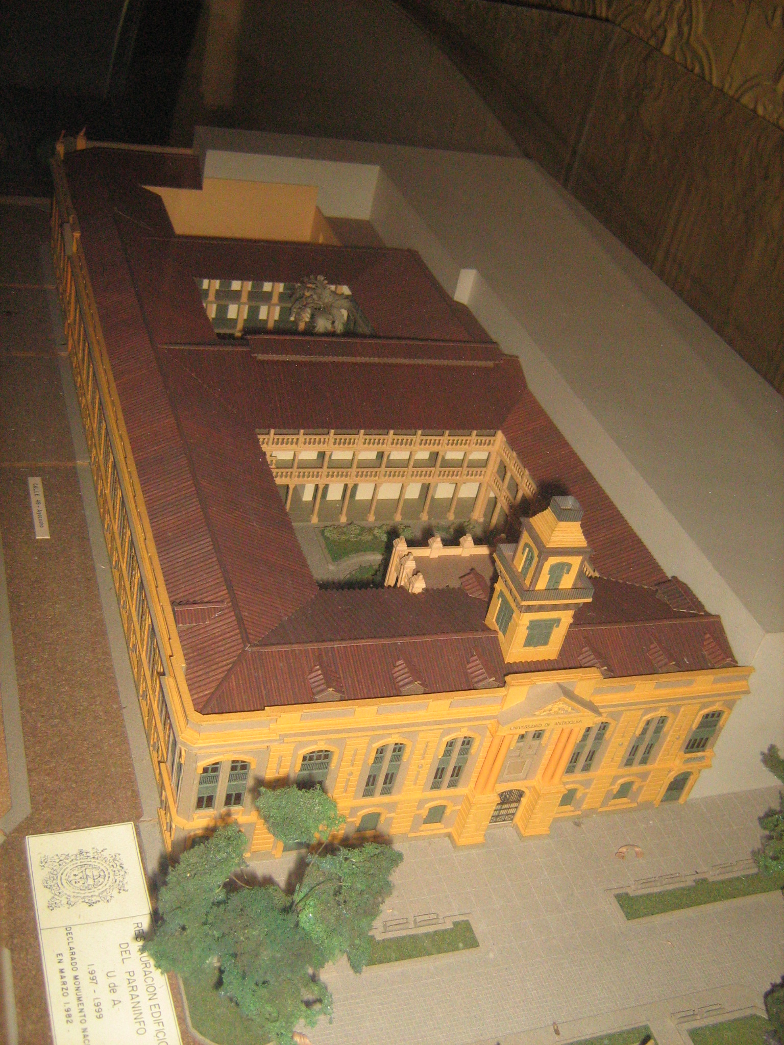 Edificio San Ignacio. Medellín, Colombia